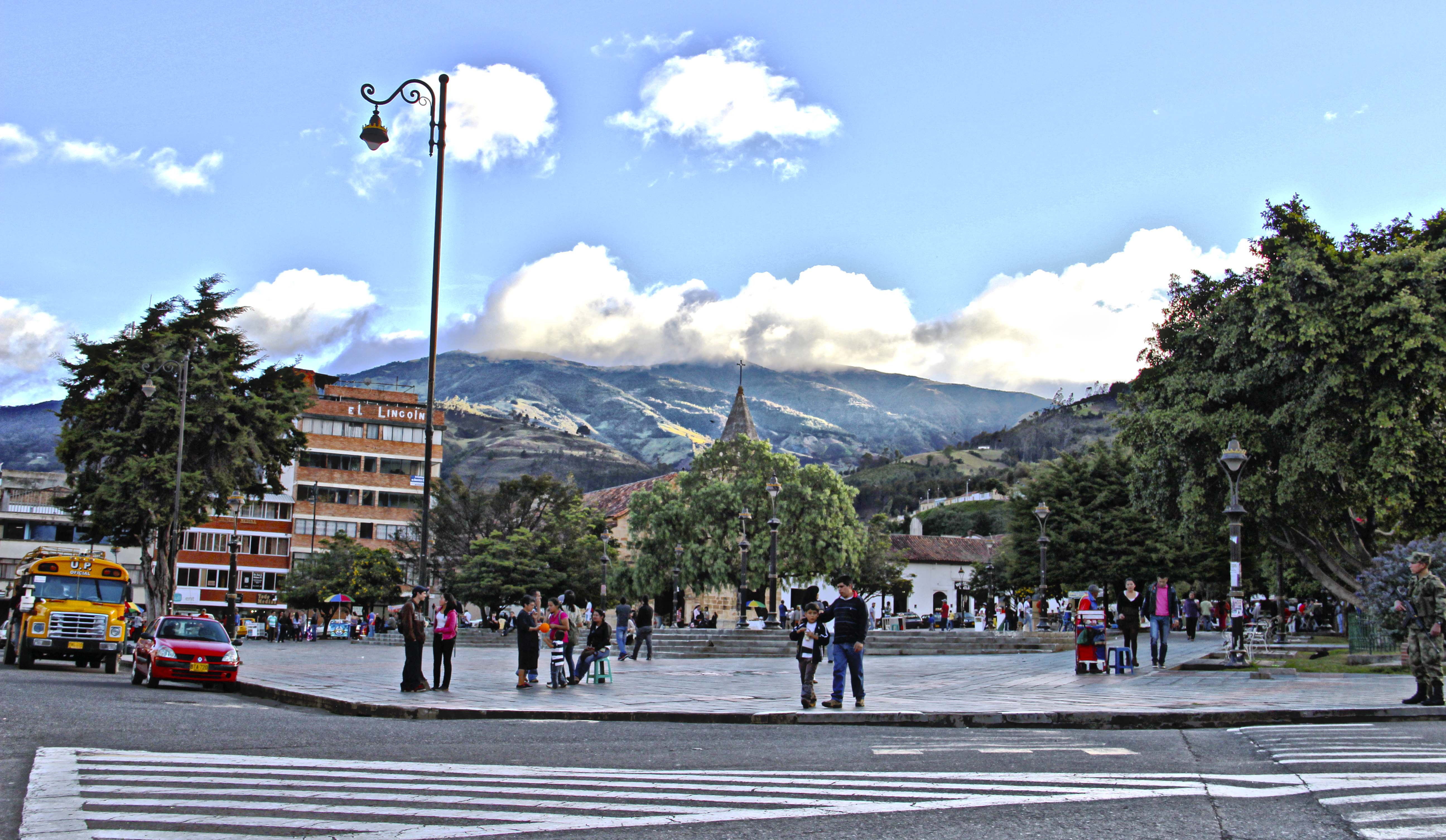 Imagen del Parque Águeda Gallardo de la ciudad de Pamplona (Norte de Santander) en Colombia.